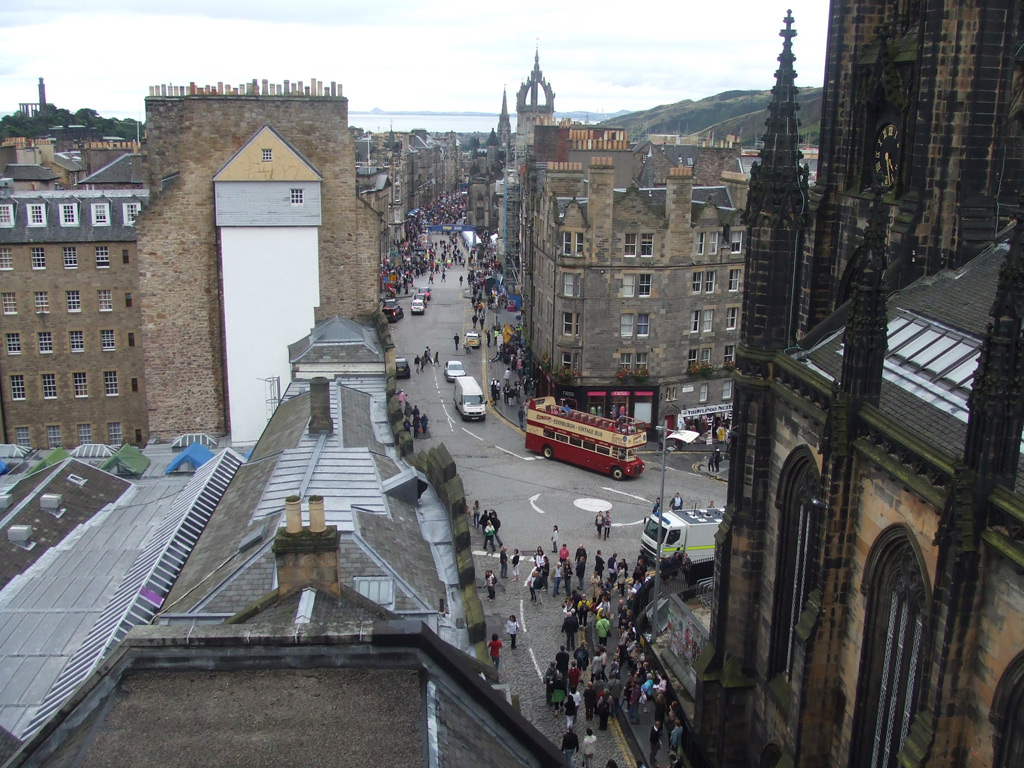 Royal Mile